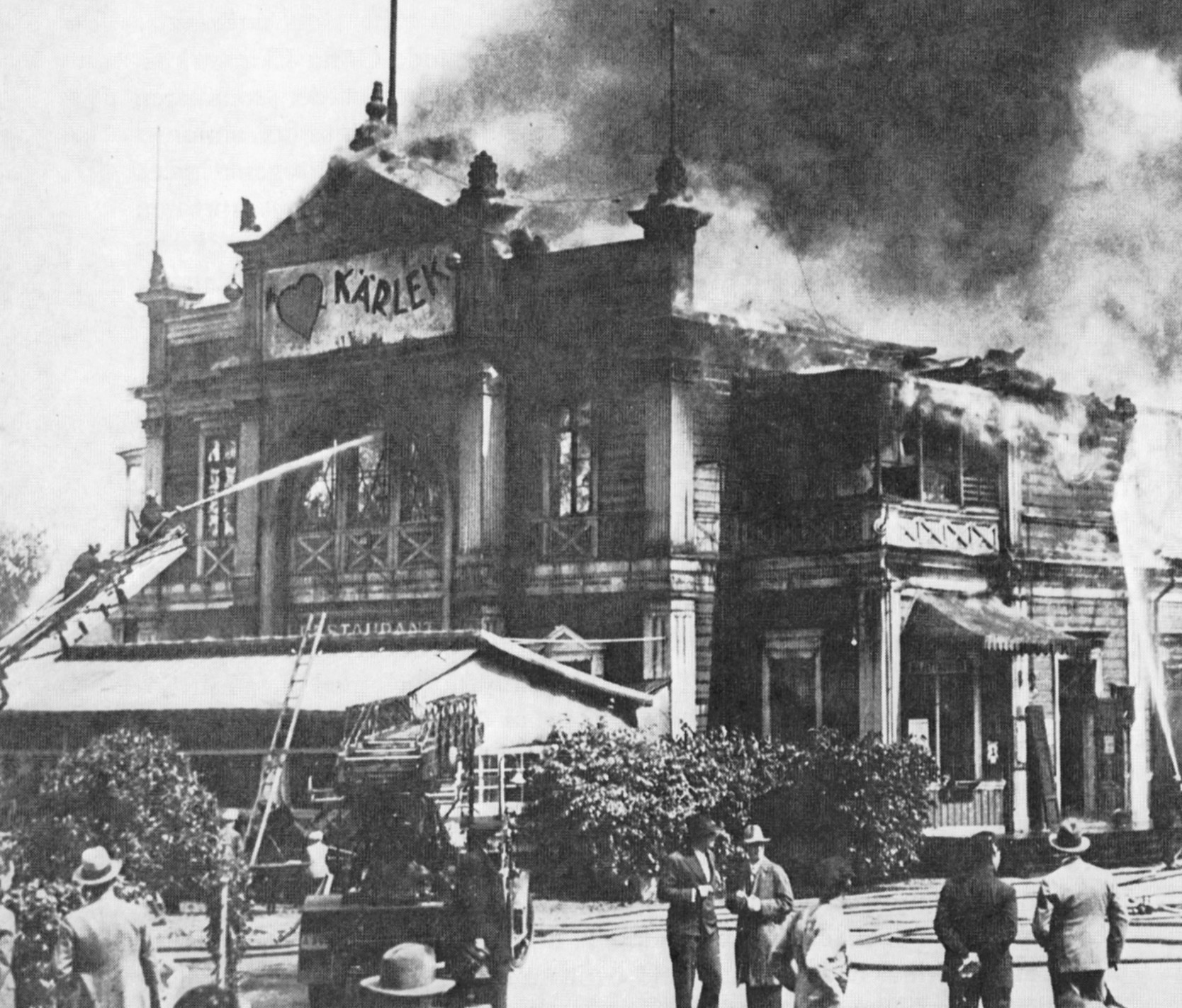 Djurgårdsteatern brinner 1929